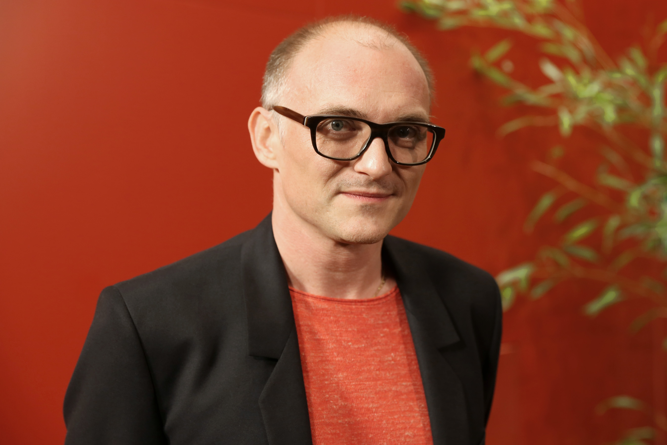 Markus Schleinzer - Nestroy-Theaterpreis 2013 in der Halle F der Wiener Stadthalle (Wien, Österreich).